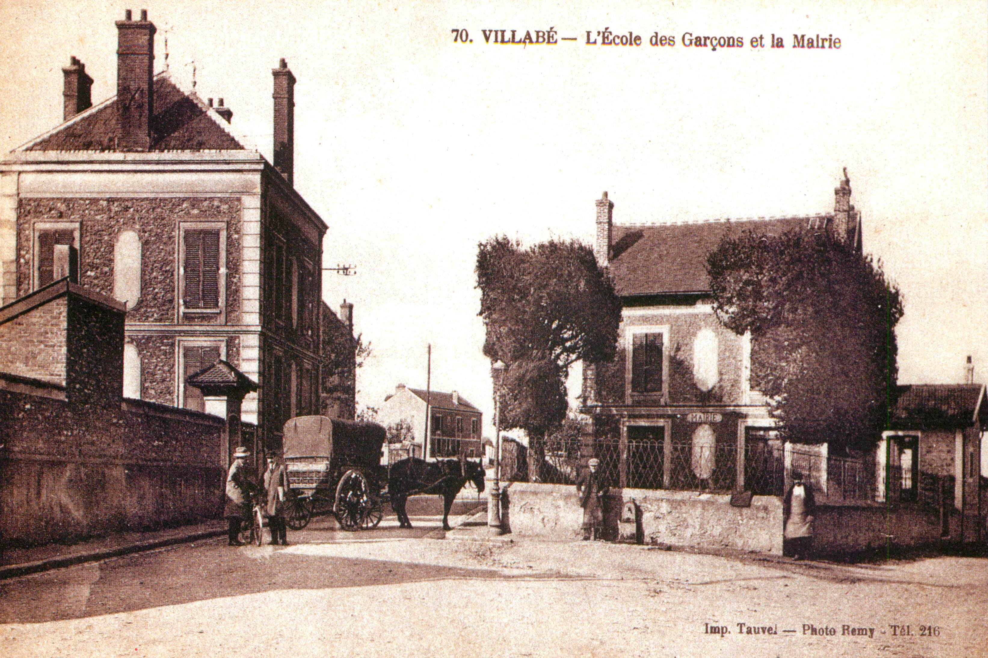 La mairie-école de Villabé construite en 1860, quartier du Pâtis / Villabé / Essonne / France